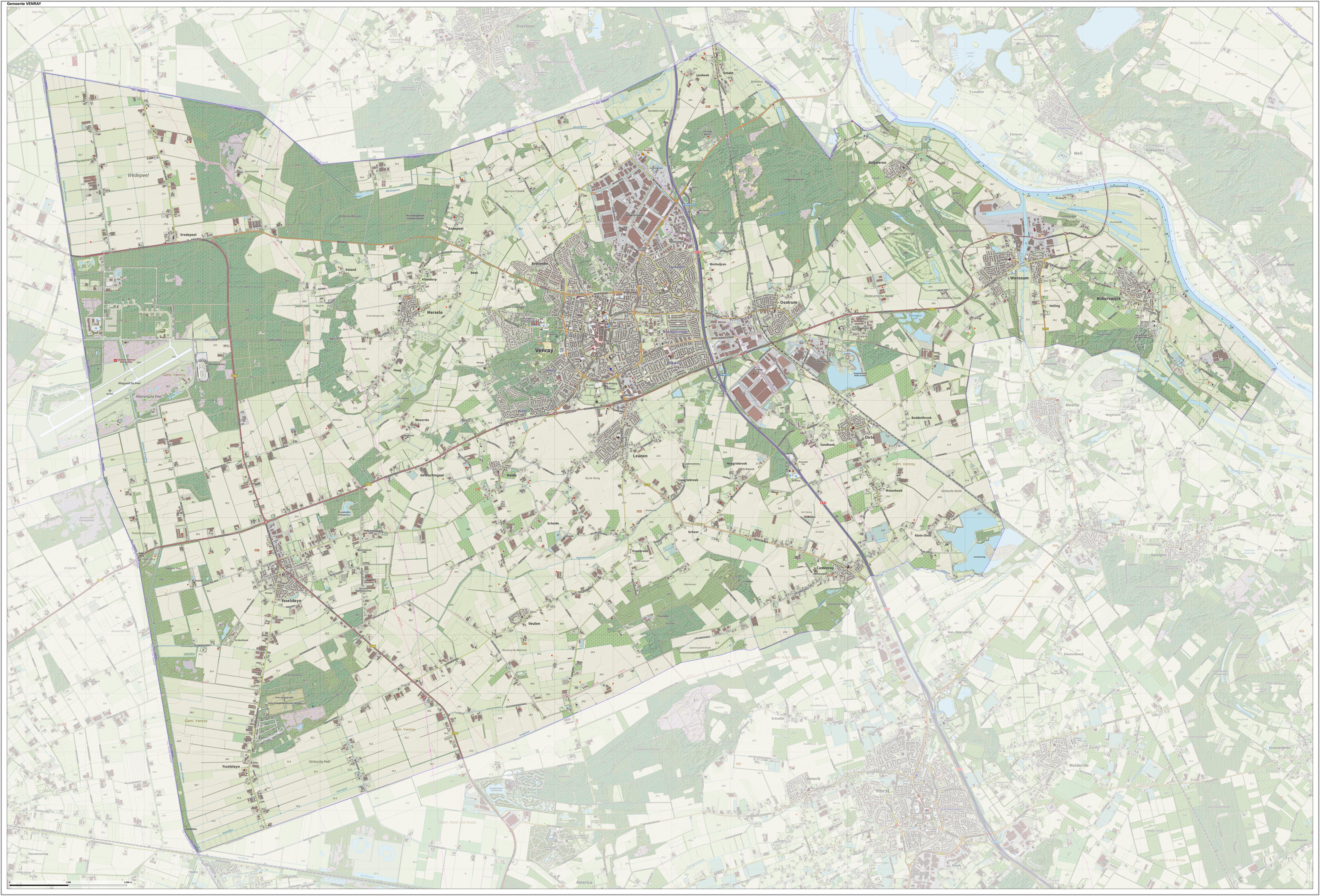 Topografische gemeentekaart. Resolutie: 400 pixels/km. Kaartbeeld samengesteld uit de open geodata van de Top10NL en Top25namen , Creative Commons BY licentie. Gebouwvlakken uit open geodata BAG extract. Wegen uit de OpenStreetMap , OpenStreetMap community. Schaduwreliëf uit de Actuele Hoogtekaart AHN2. Samenstelling en kleurenschema: Jan-Willem van Aalst, met QGIS2. Zie ook de Legenda.